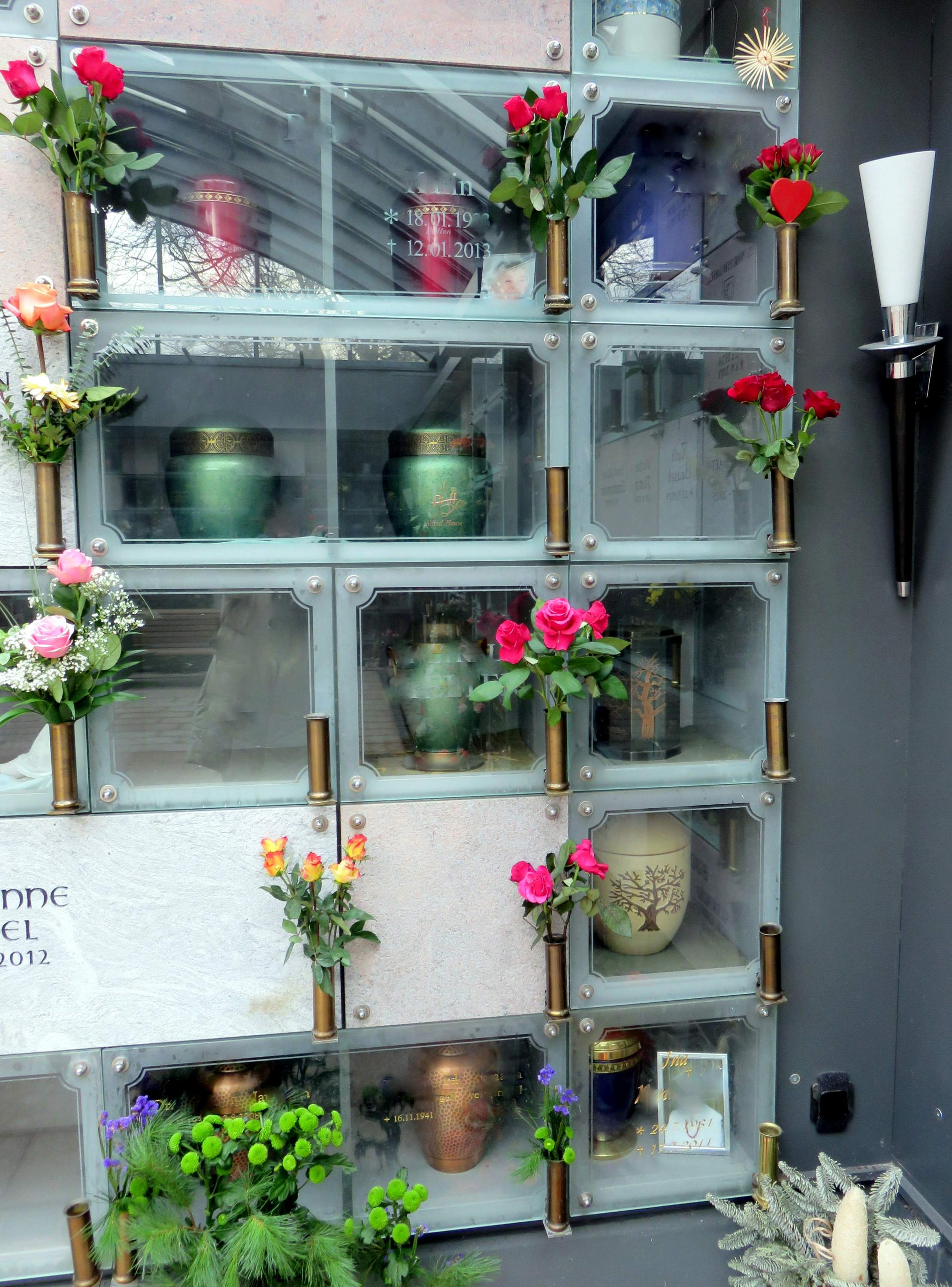 Urnenfach für den Violinisten und Kapellmeister Alfred Hause im Kolumbarium neben Kapelle 11 auf dem Hamburger Ohlsdorfer Friedhof, errichtet 2004.